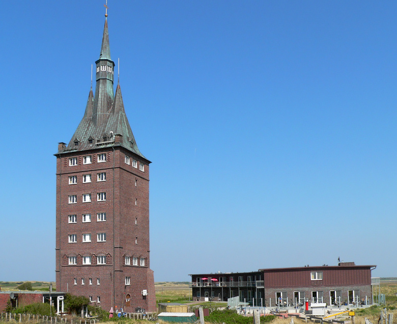 Wangerooge: Westturm mit Jugendherberge